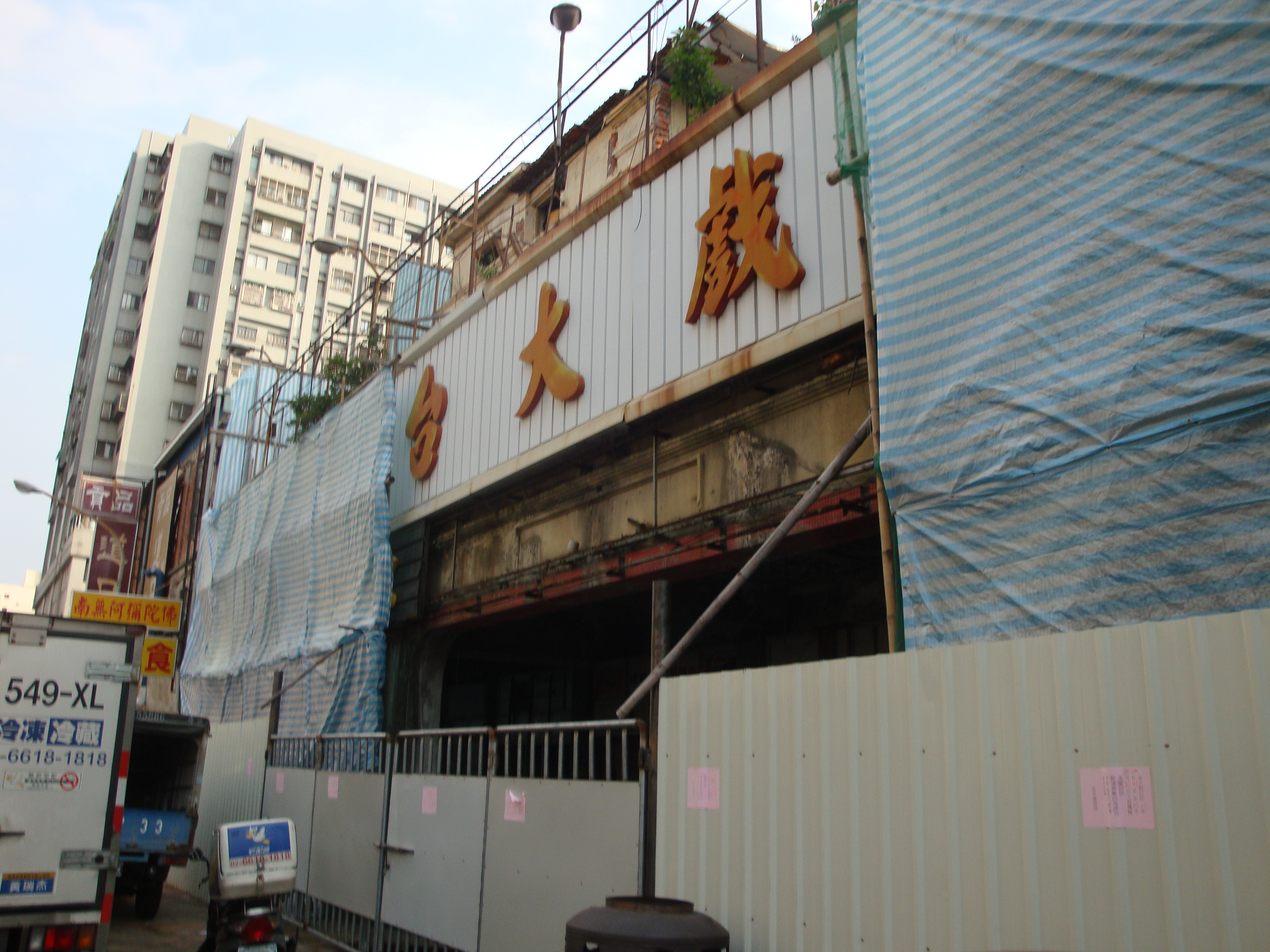 中文（台灣）: 大舞台戲院入口處